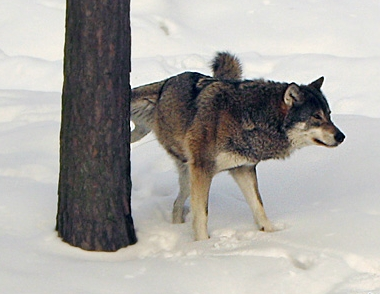 Lobo marcando su territorio mediante sus fluidos corporales. Zoo de Kolmården (Suecia).